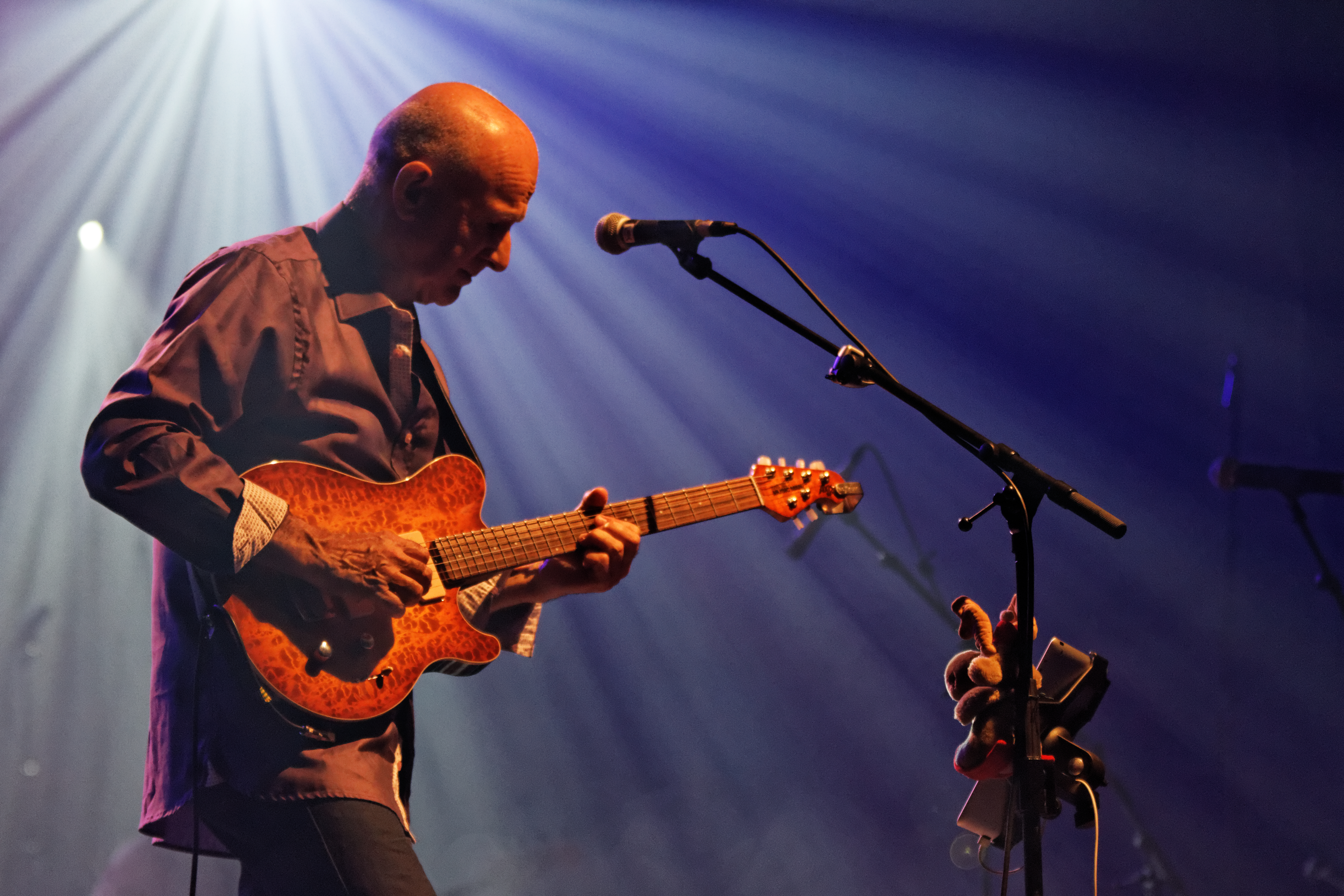 Dan ar Braz en concert sur la scène Gradlon lors du festival de Cornouaille 2013.